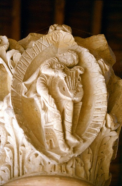 Cluny